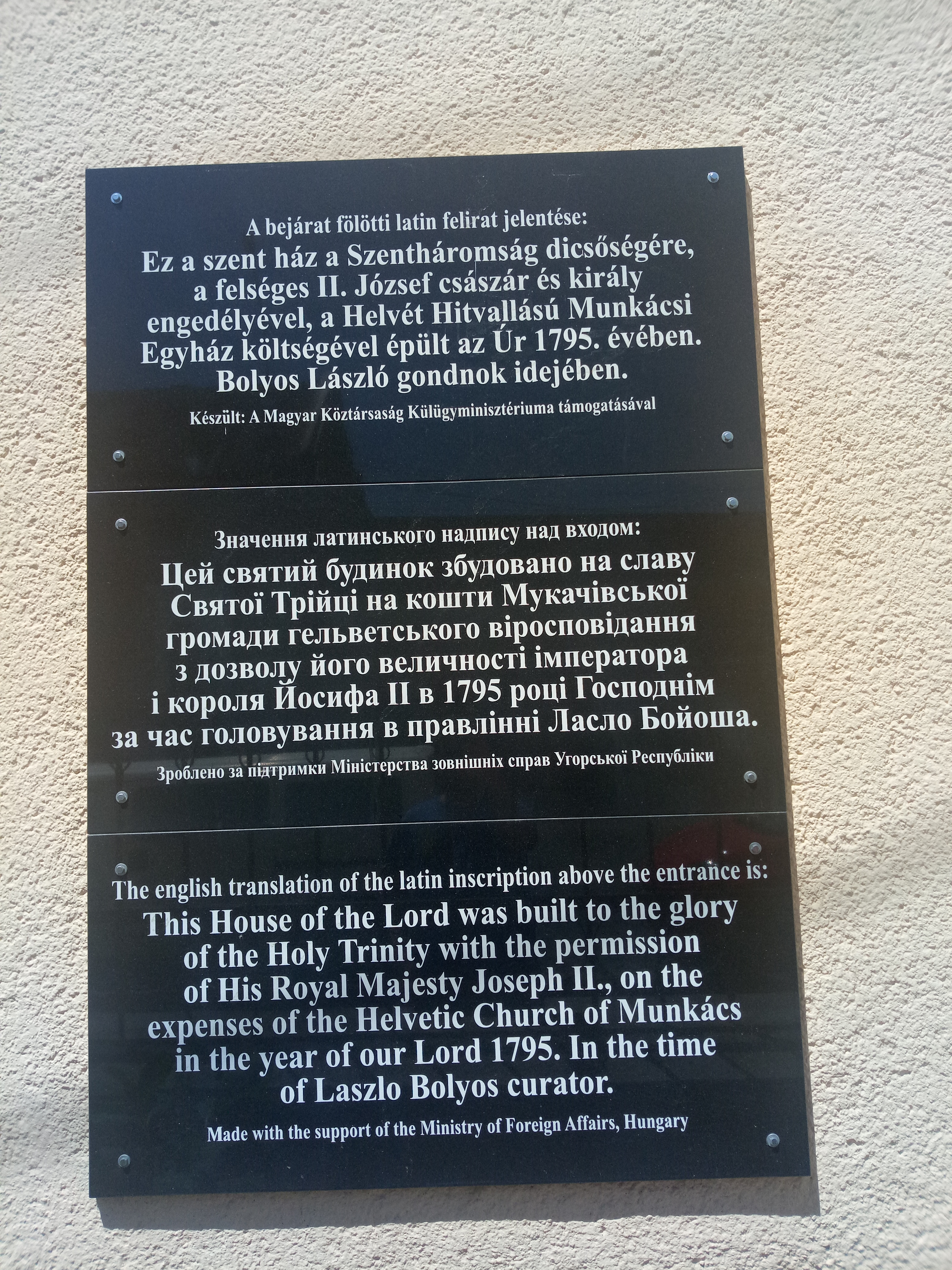 Реформатська церква, Мукачево, вул.Духновича,11